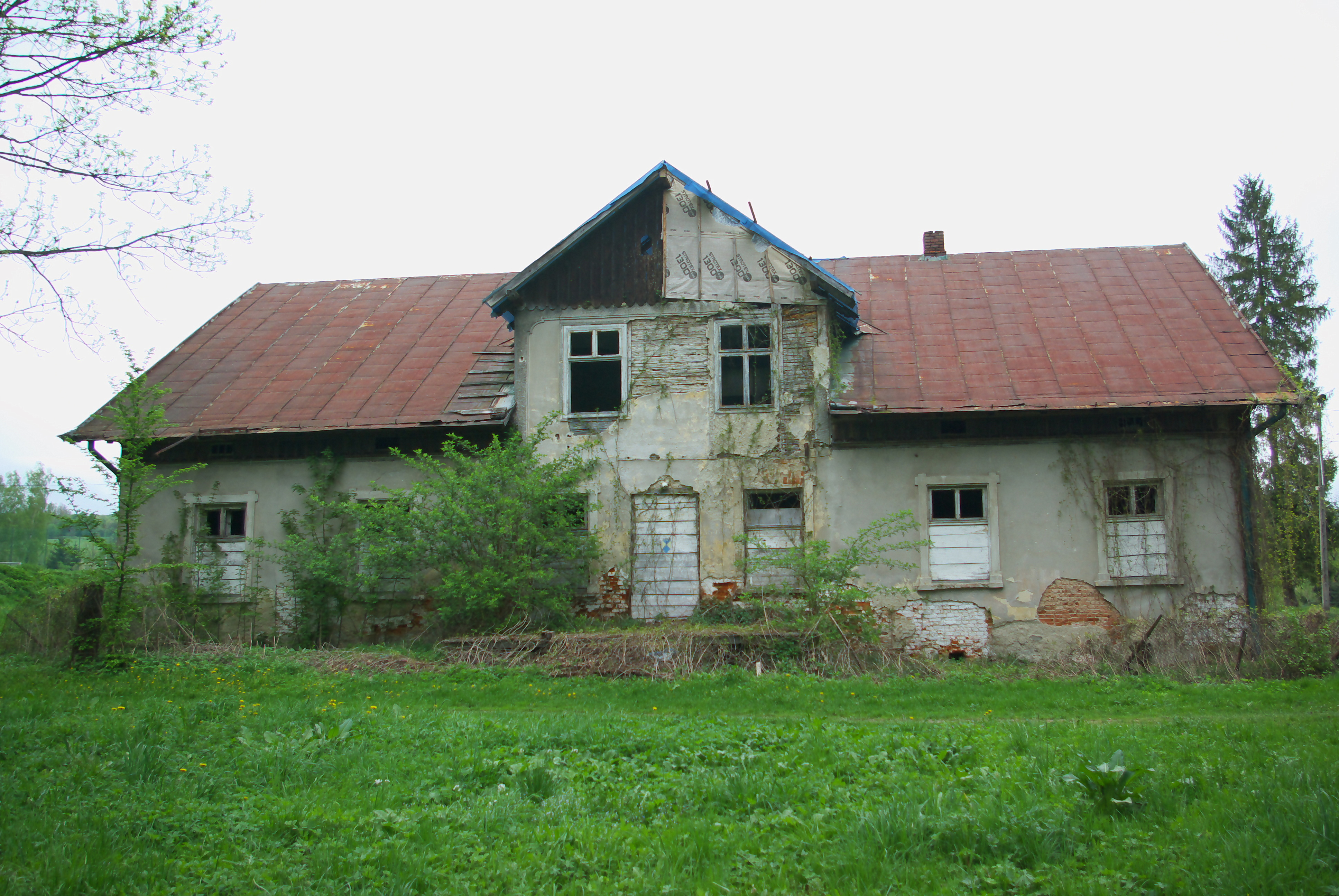 Budynek dworu w Falejówce (2018).